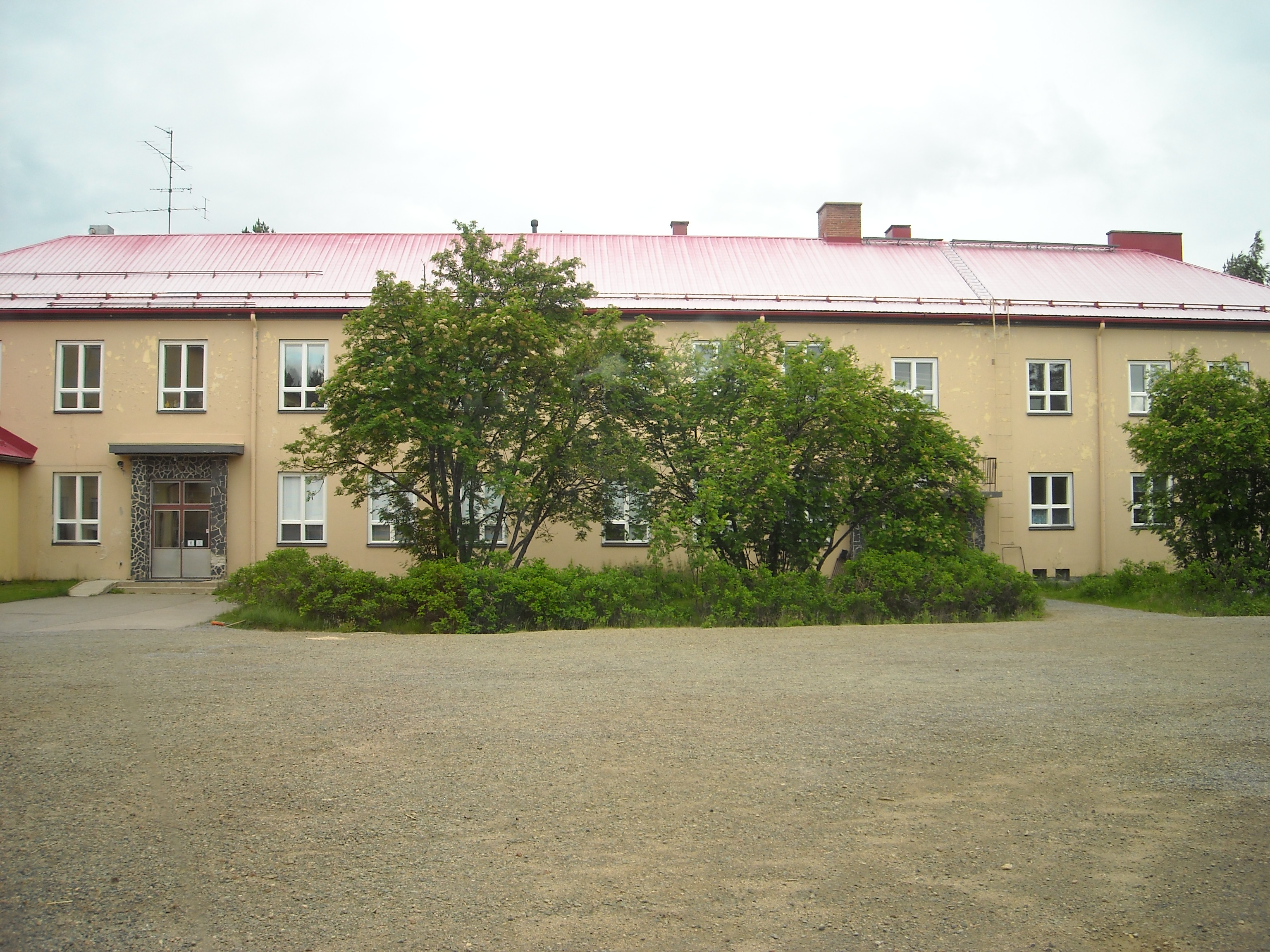 Sieppijärven alaaste